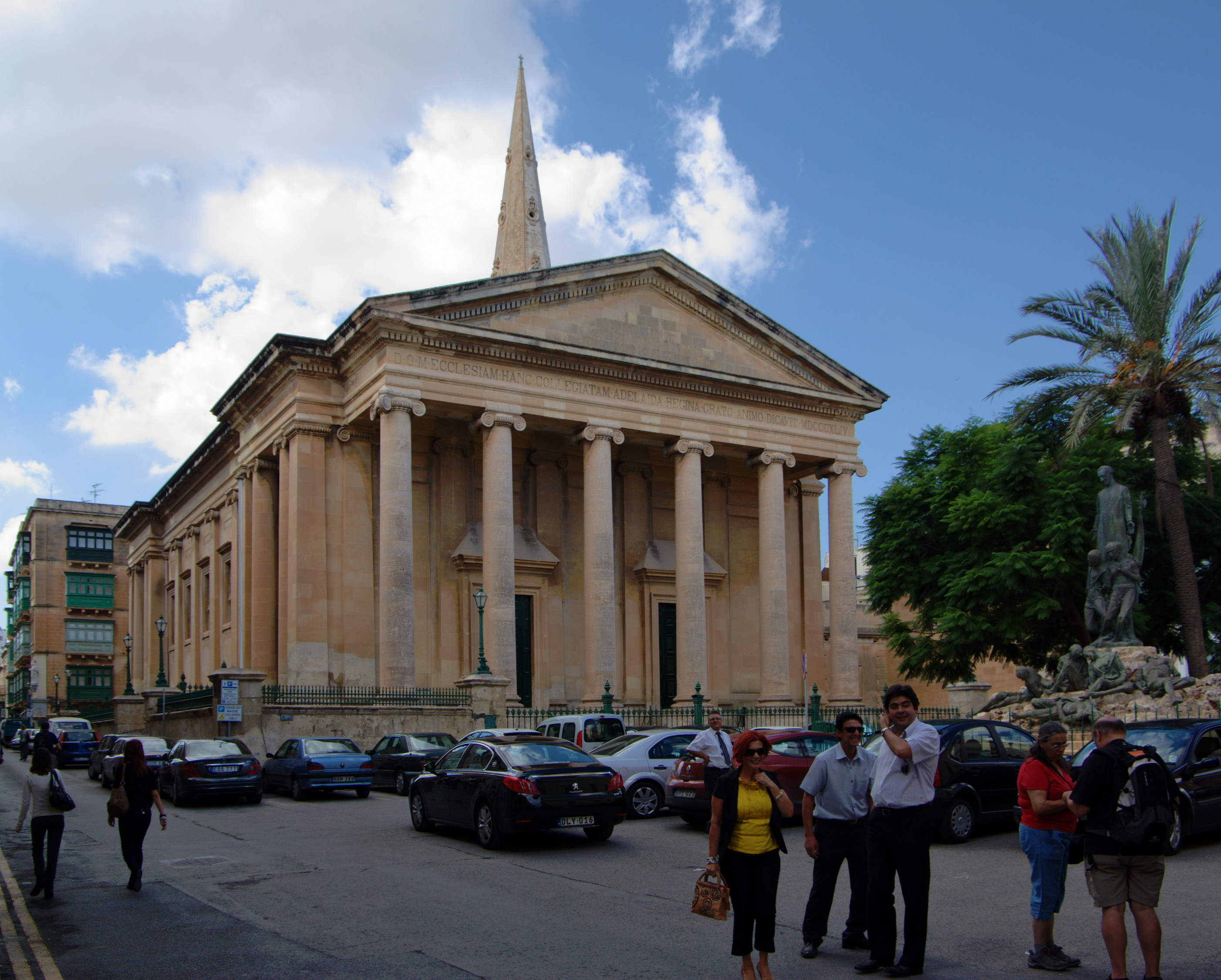 Malta, Valletta, anglikanische St. Paul's Kathedrale